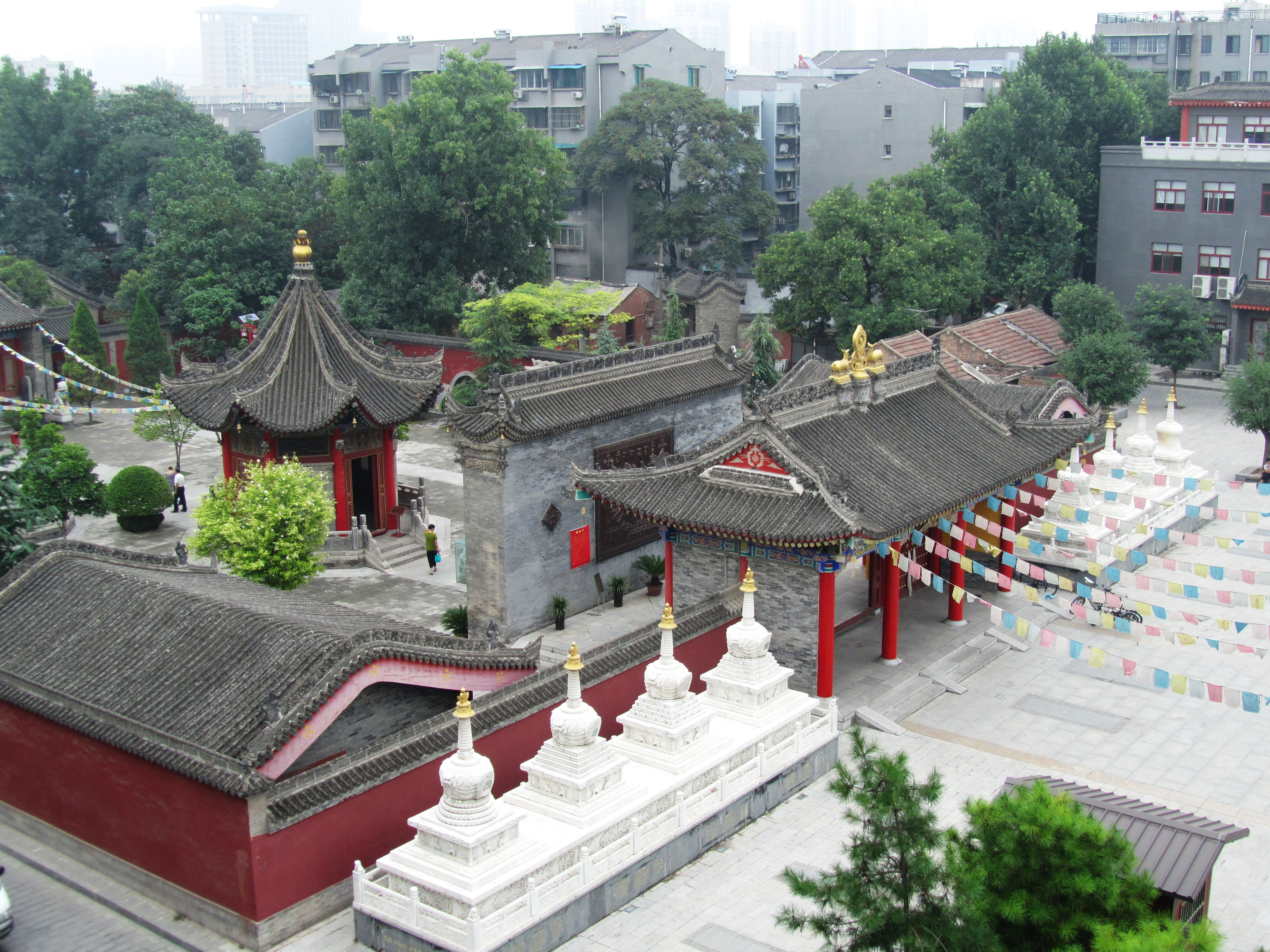 广仁寺，山门、影壁和碑亭，自南向北看。